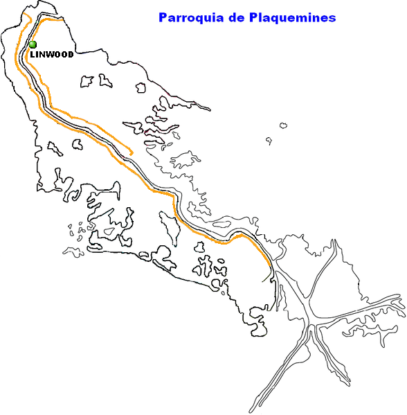 Linwood, Louisiana.